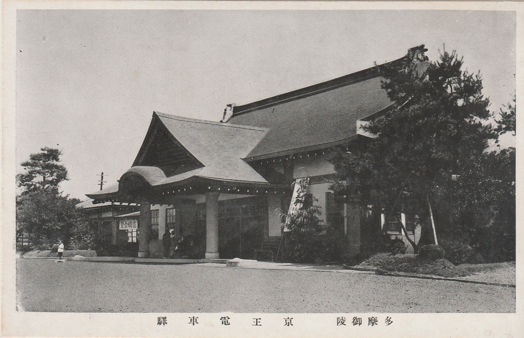 京王御陵線多摩御陵前駅